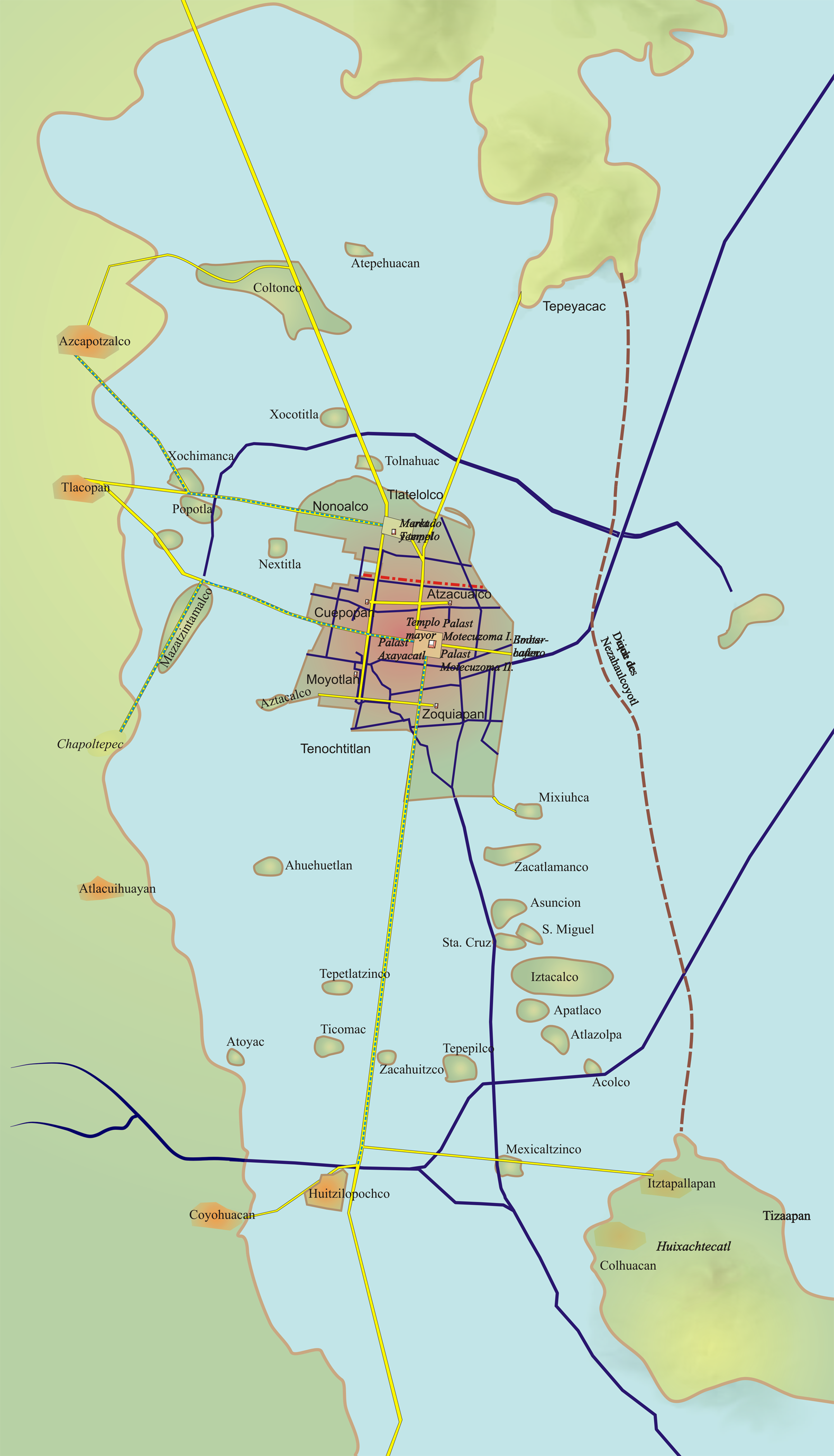 Plan of Tenochtitlan